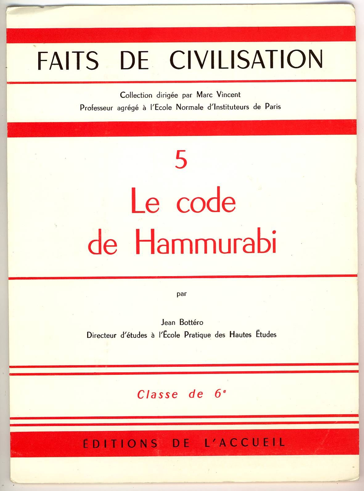 Le code de Hammurabi